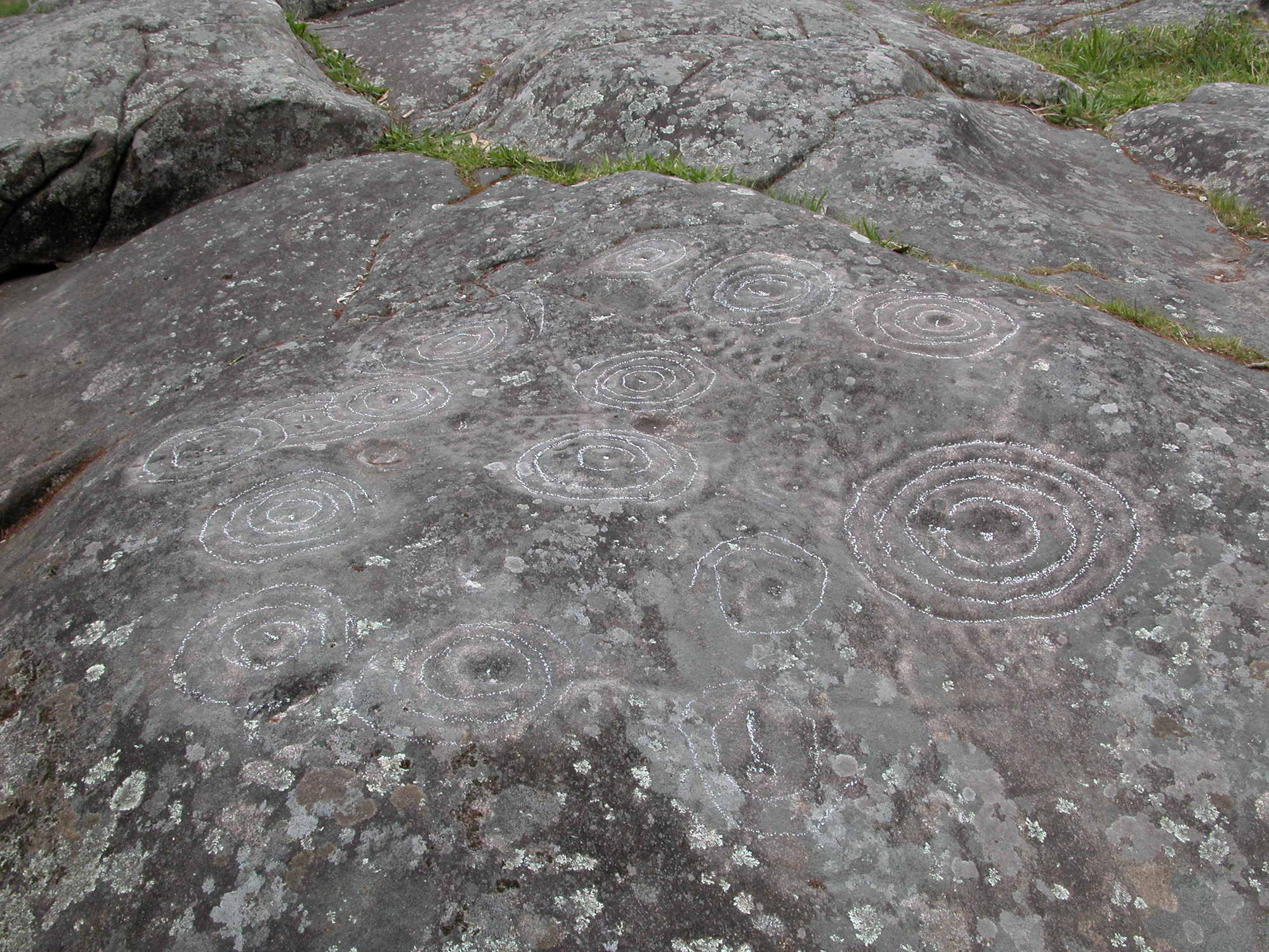 Petroglifos de Mogor. Concello de Marín.